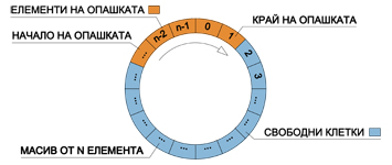 Diagram representing queue in array